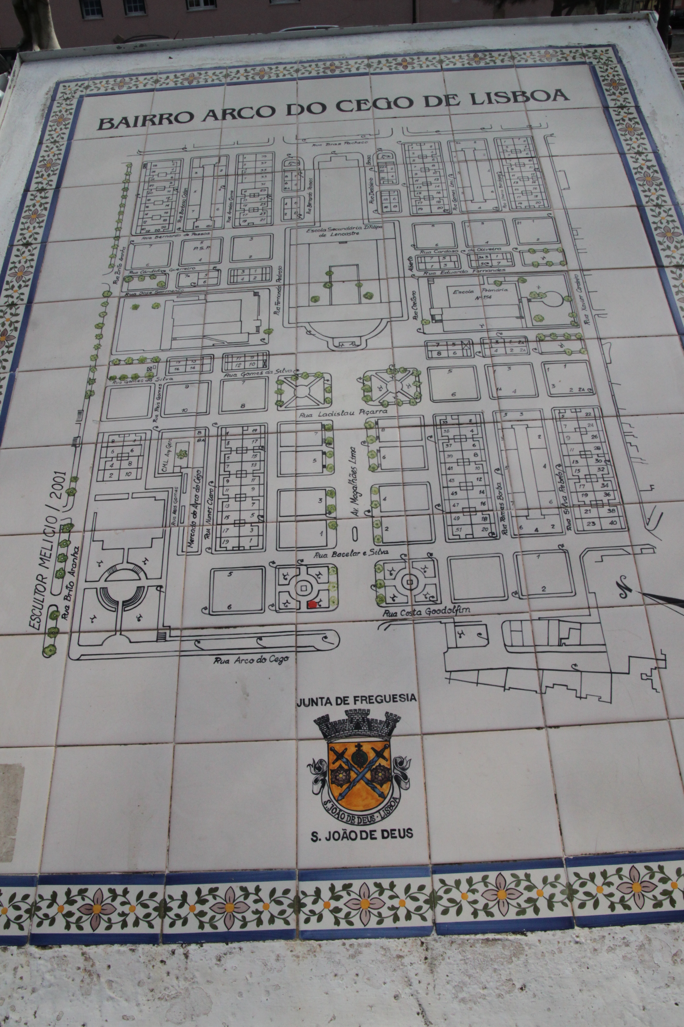 Bairro do Arco do Cego This file was uploaded for Wiki Loves Monuments in Portugal with the unique identifier 97005970.